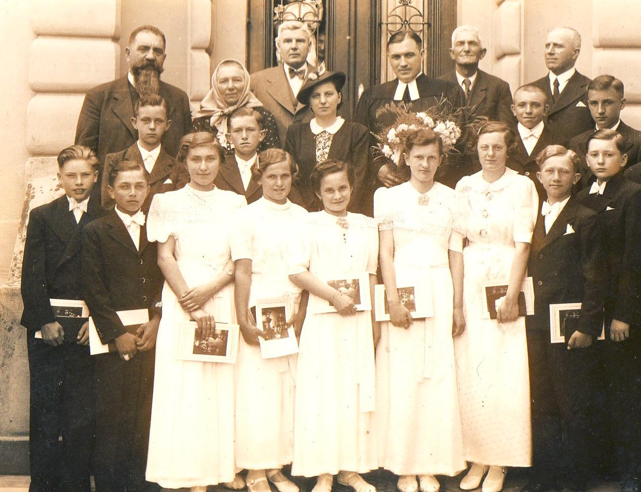 Konfrimace v Přelouči, J. A. Pellar s manželkou Evou roz. Luklovou